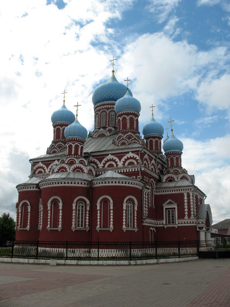 Собор в честь Воскресения Христова (1848) г. Борисов